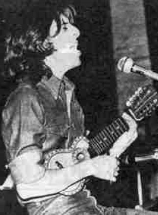 Roque Narvaja. Argentina